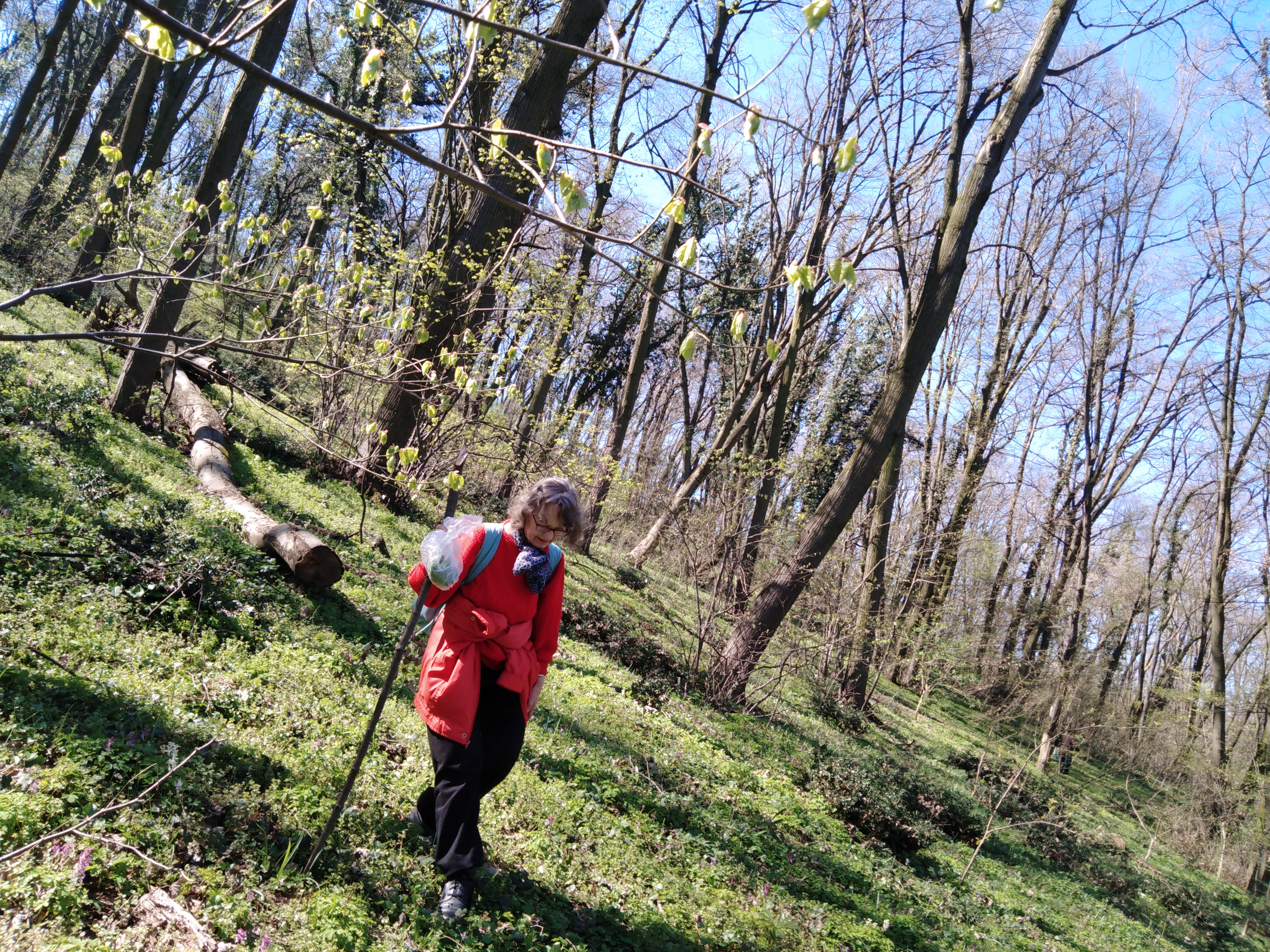 Članovi gljivarskog udružewa u gljivolovu.